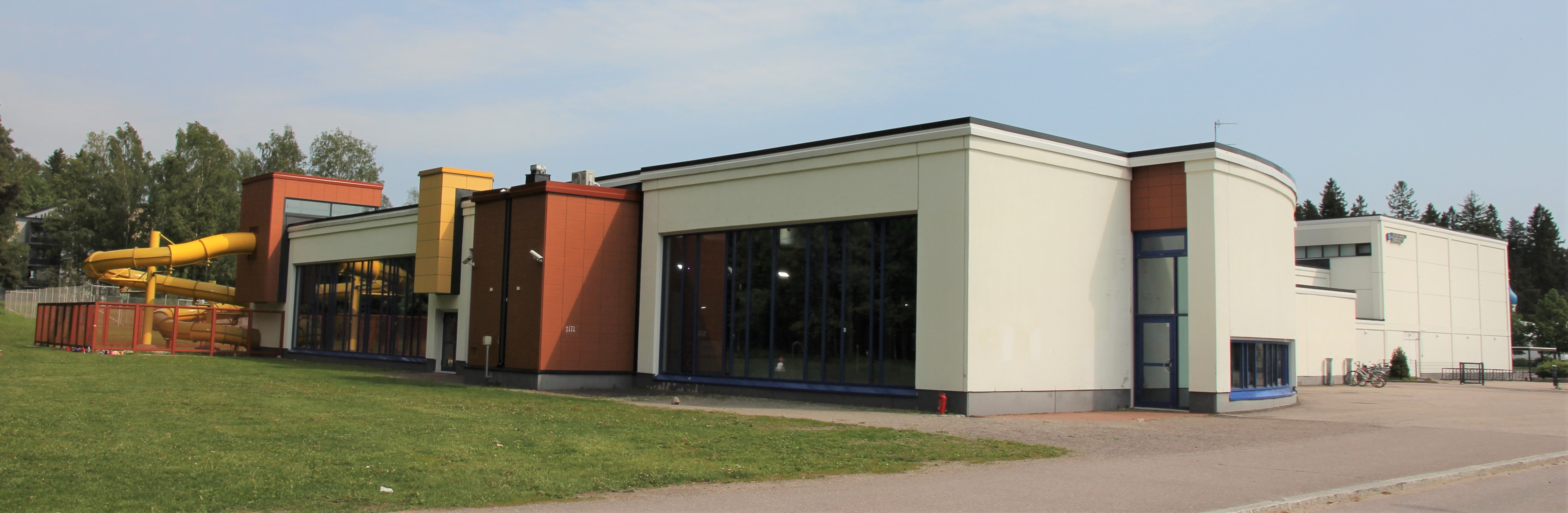 Järvenpään uimahalli on kunnallinen urheilu- ja kuntoilurakennus Järvenpäässä. Uimahallin osoite on Seutulantie 17, Järvenpää.